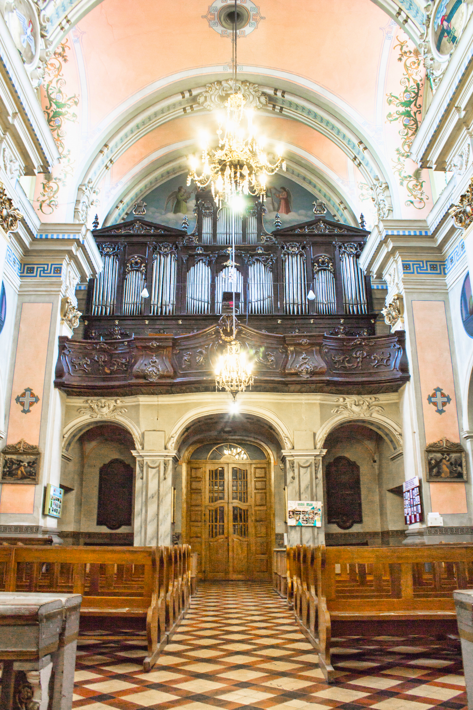 Катедральний костел святої Софії та дзвіниця, Житомир, Замковий майдан, 2